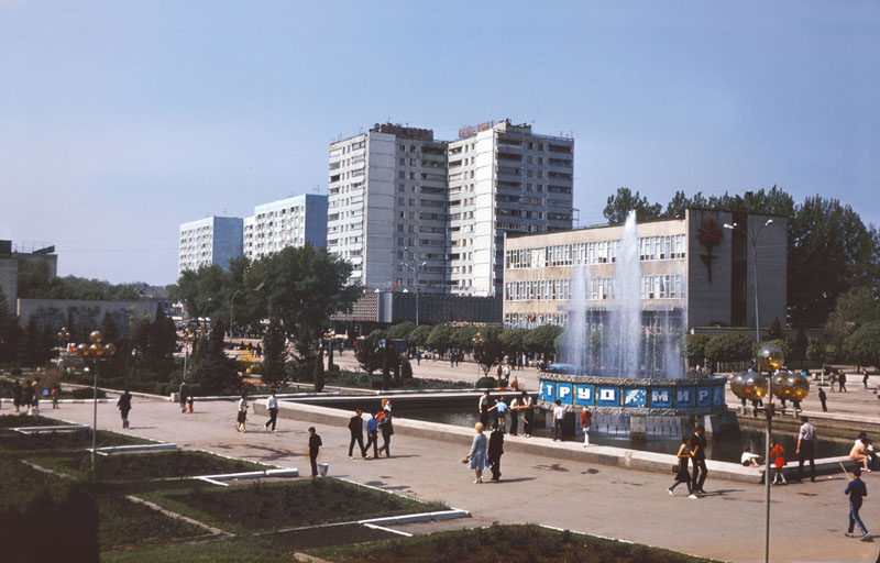 Balti Center (1985).